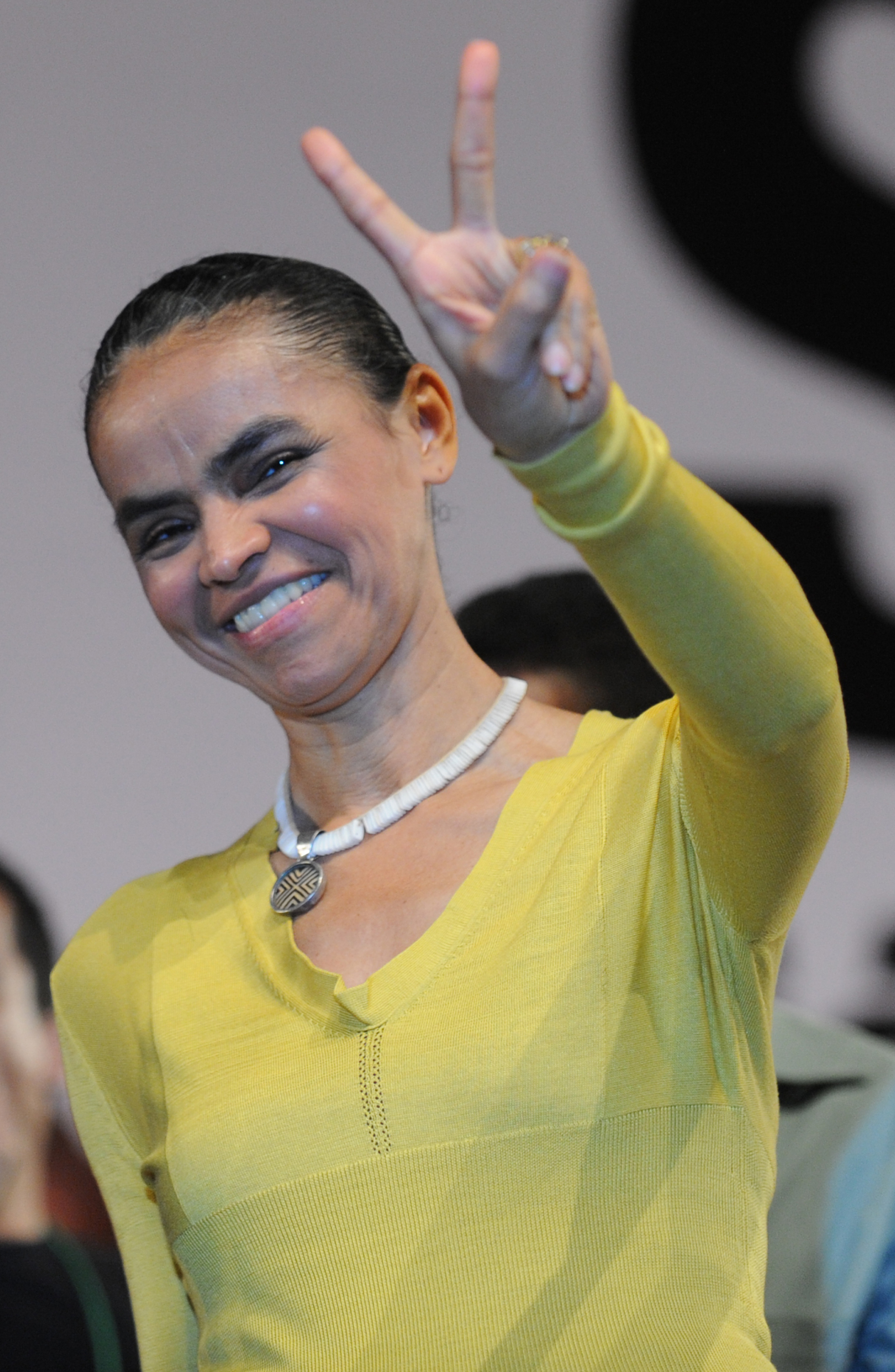 Brasília - Convenção Nacional do Partido Verde lança oficialmente Marina Silva para concorrer à Presidência da República.